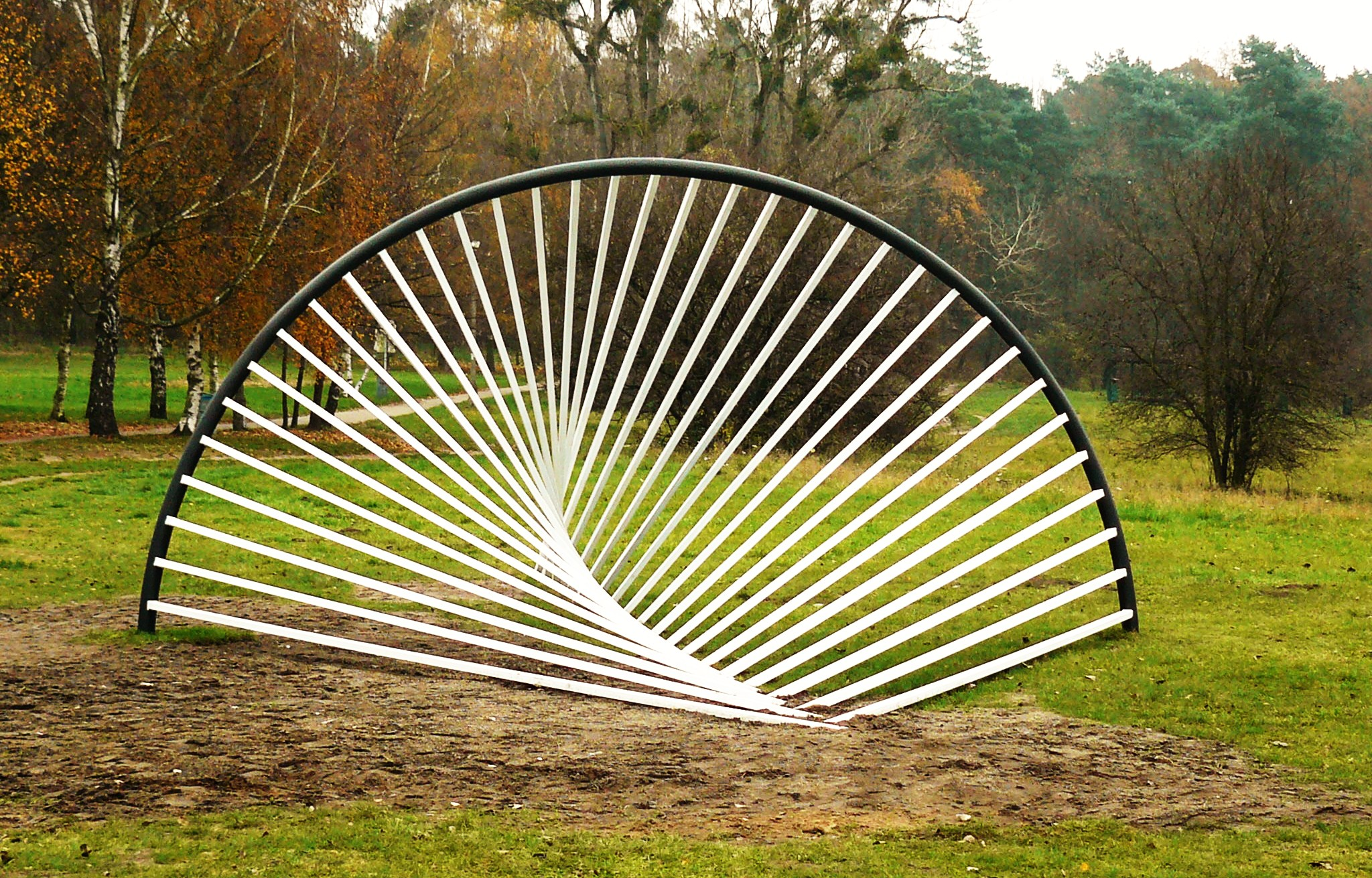 Rzeźba AXIS Sławomira Brzoski nad jez. Strzeszyńskim w Poznaniu.